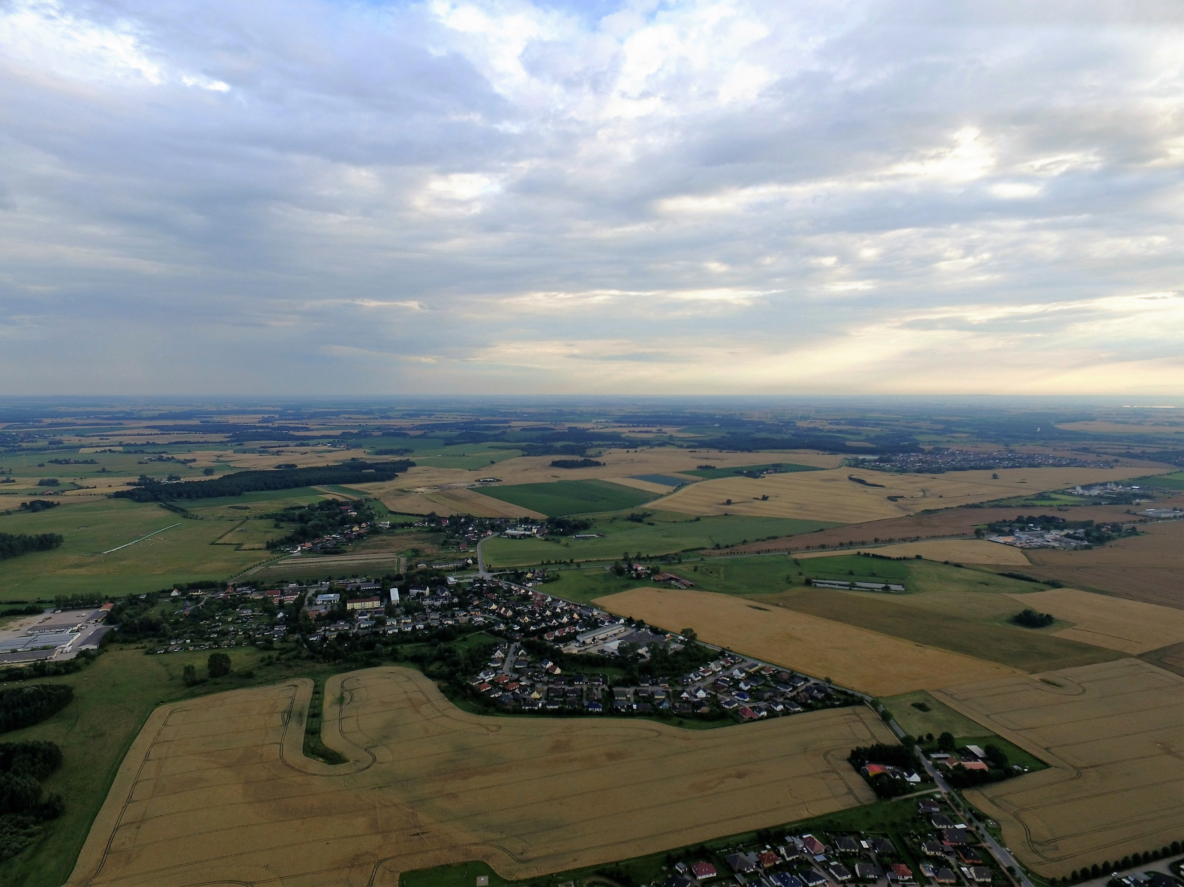 Ein Luftbild von Broderstorf. Erstellt und bereit gestellt von R. Bösenberg